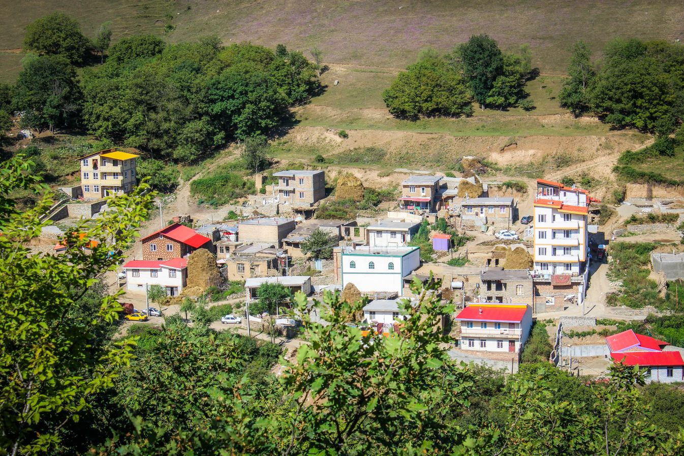 نمای روستای علی آباد-کلیبر-تبریز-آذربایجانشرقی-ایران